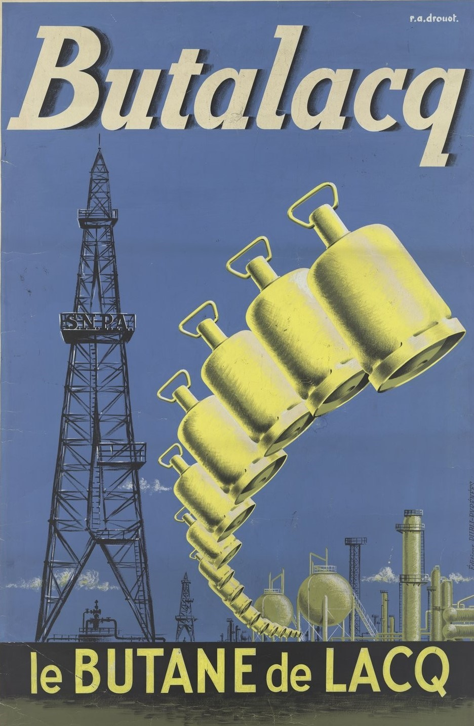 Butalacq. Le Butane de Lacq / Drouot, R. A.